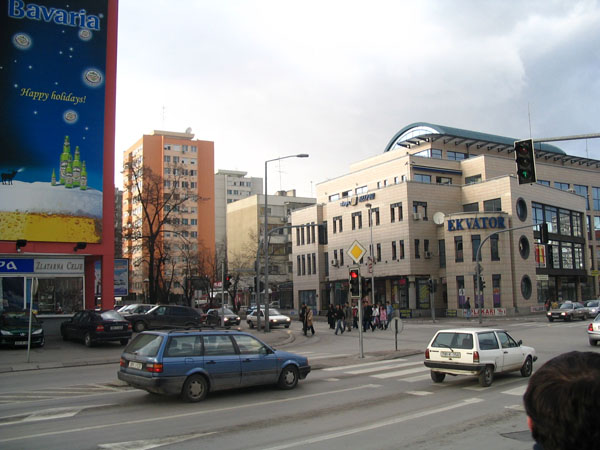 Раскрсница на булевару Цара Душана